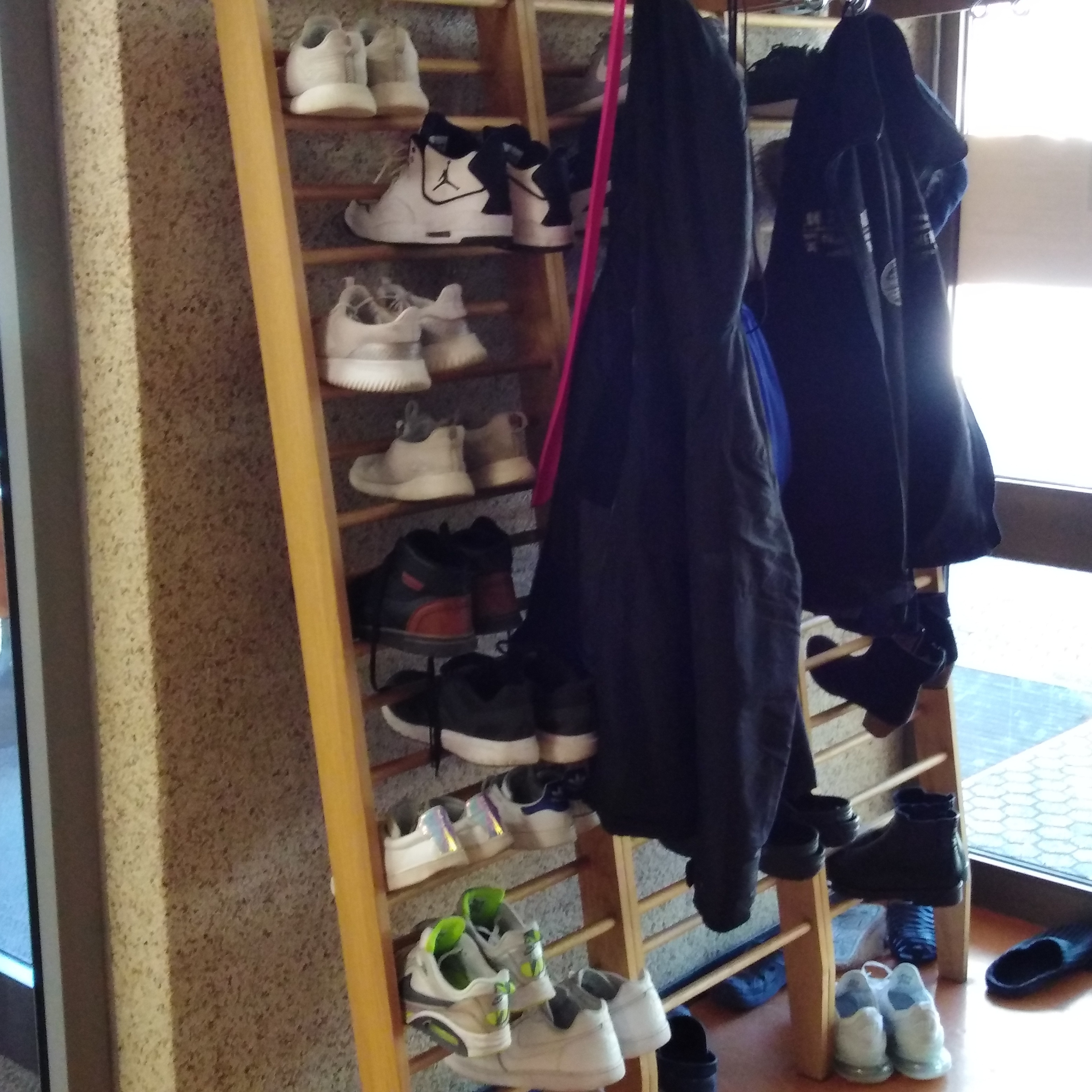 Alemannenschule (ASW) in der Gemeinde Wutöschingen im Landkreis Waldshut in Baden-Württemberg. Die Hausschuhkultur (Ablage der Straßenschuhe) der Gemeinschaftsschule.